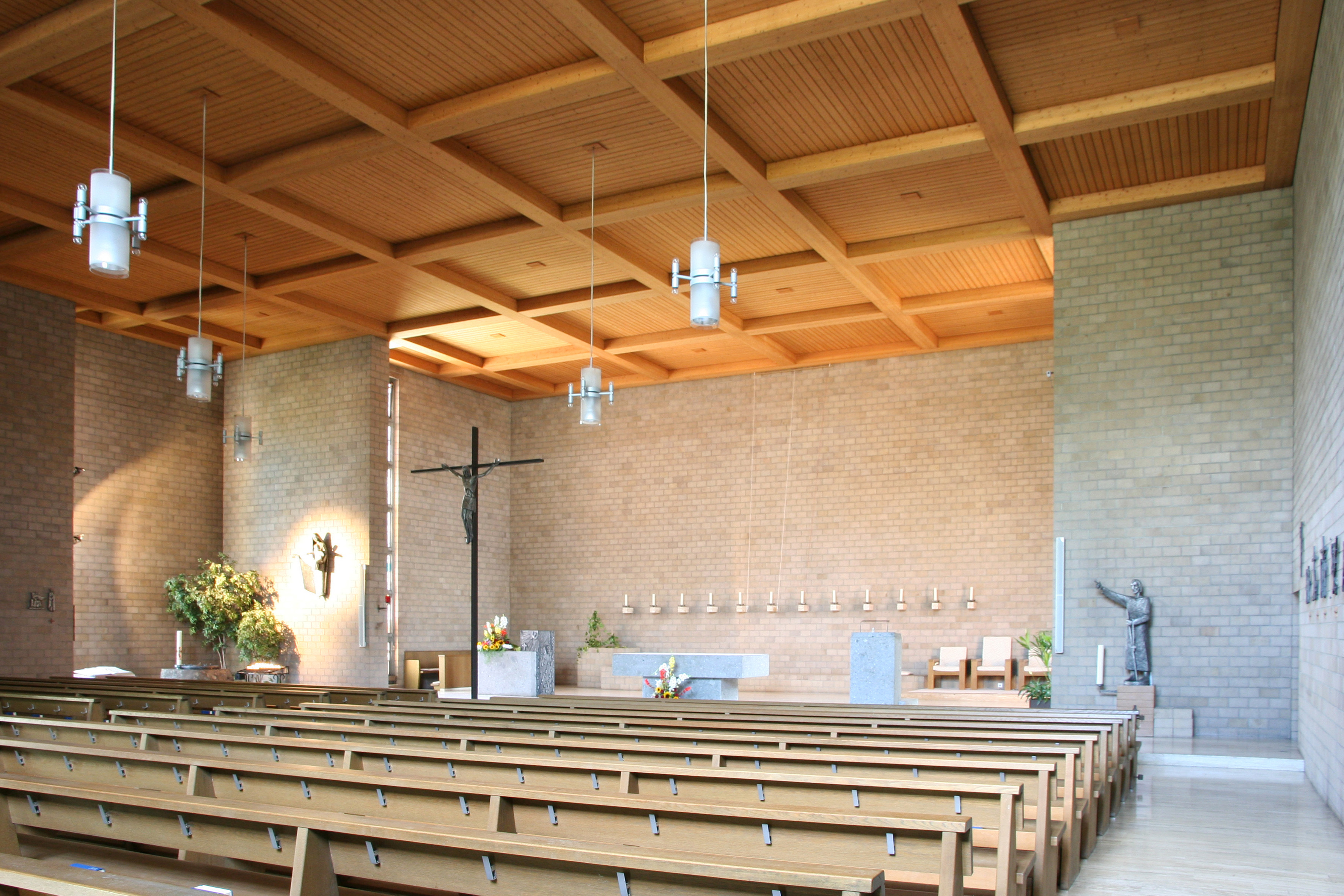 Römisch-katholische Kirche Bruder Klaus Diessenhofen TG